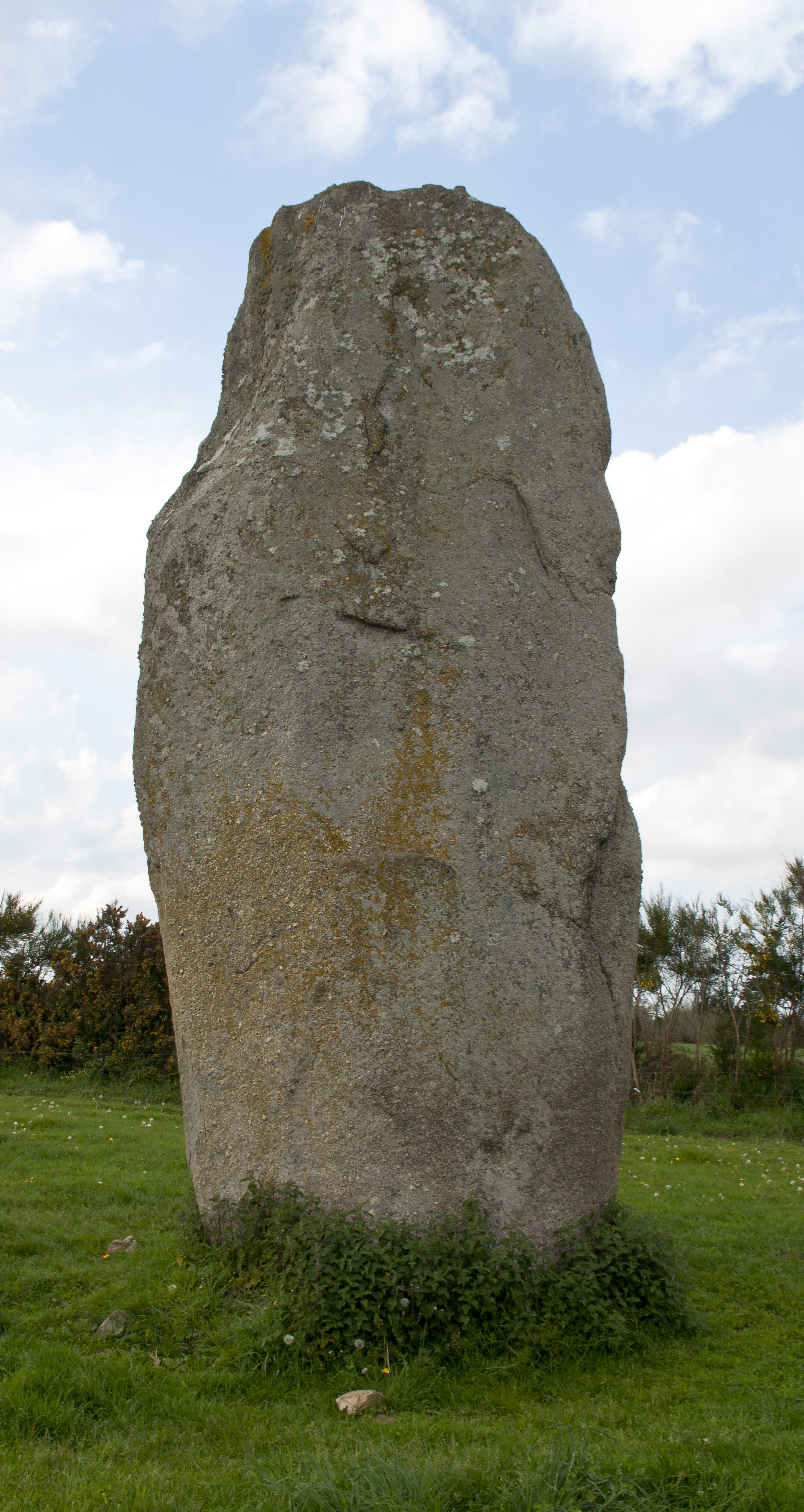 Le Menhir de Kerguézennec se situe sur la commune de Bégard dans le département des Côtes d'Armor .